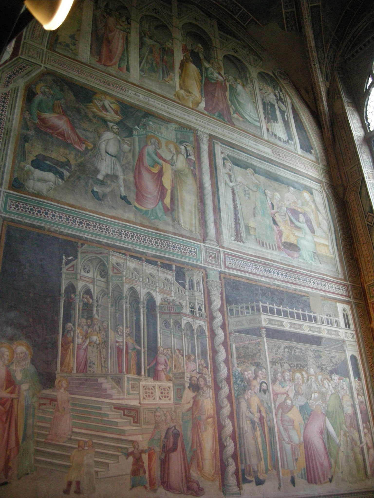 Cappella rinuccini 007